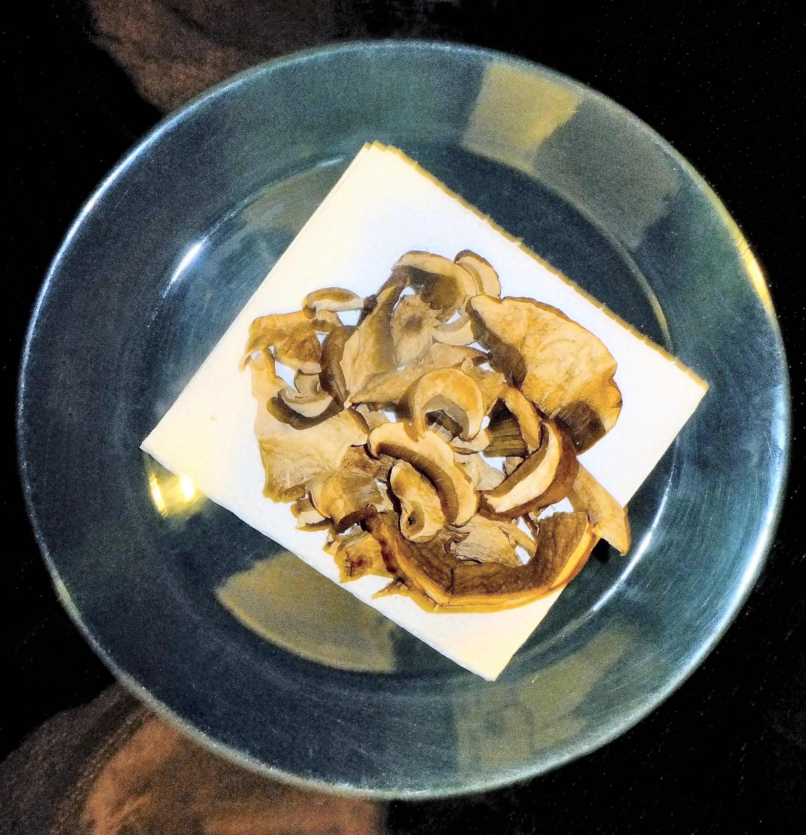 Steinpilze, getrocknet